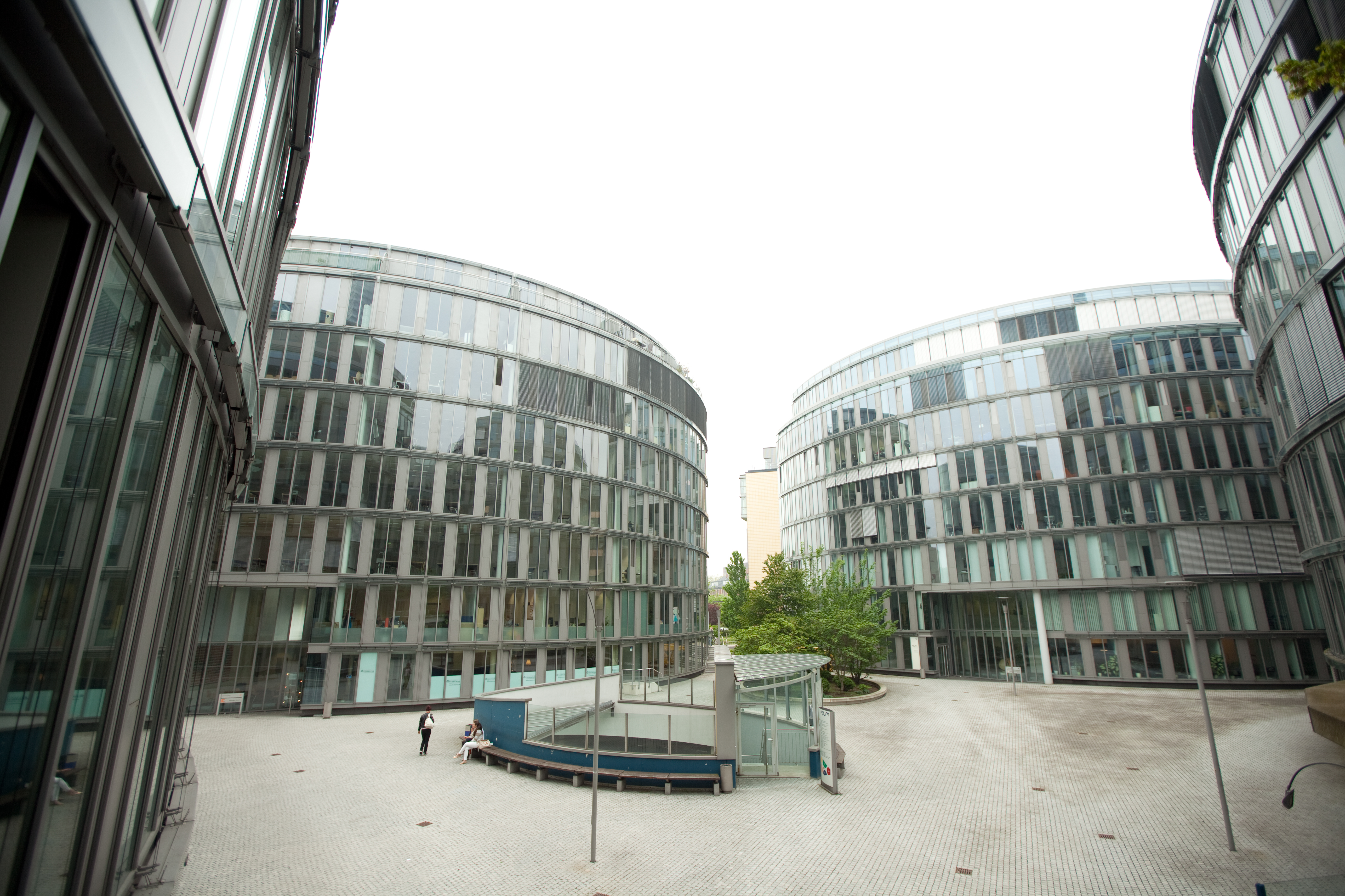 Standort Köln Innenhof